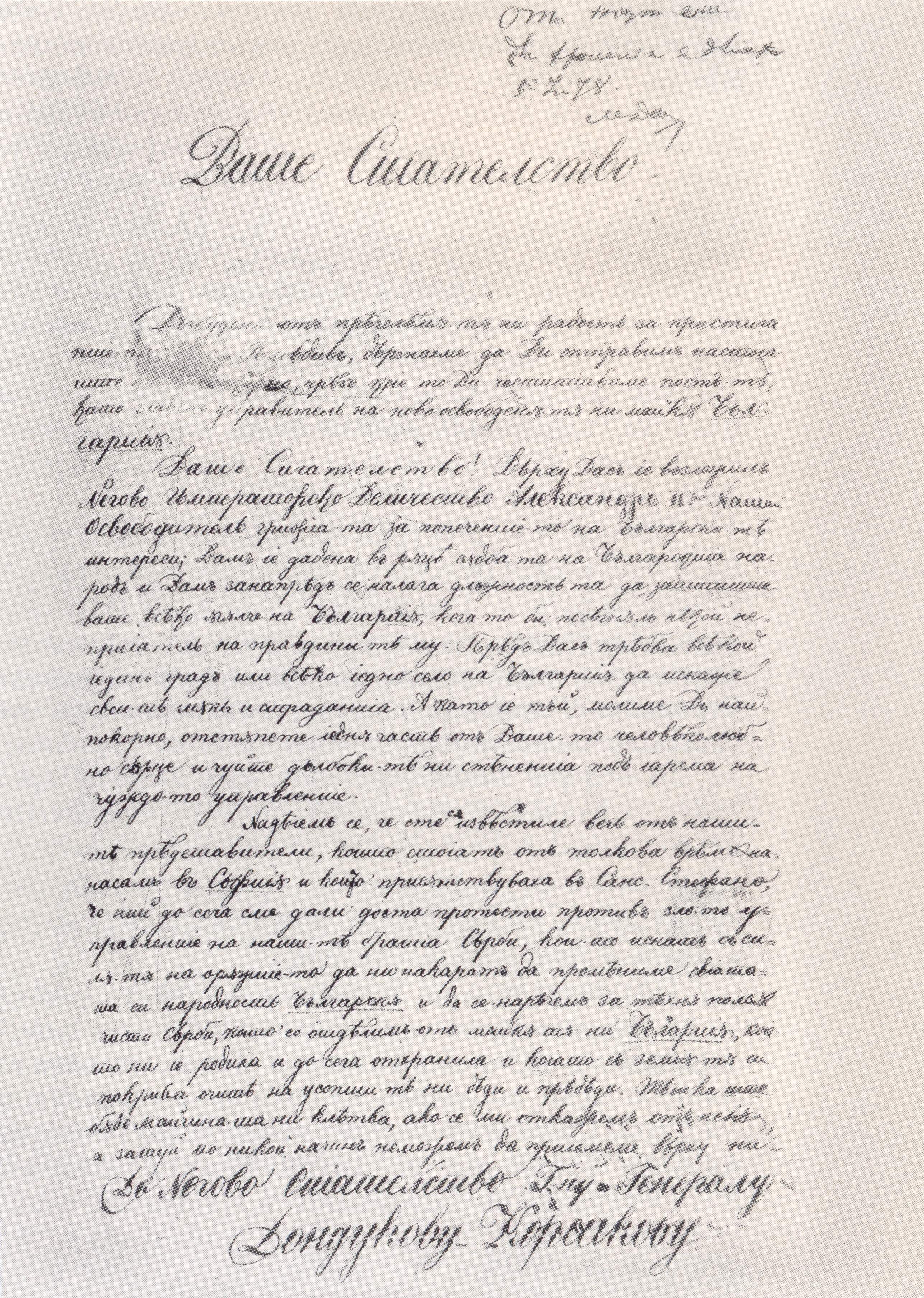 Молба за освобождение от жителите на град Пирот до княз Дондуков-Корсаков. 27 май 1878 (първа страница). Текст: „Ваше Сиятелство! Възбудени отъ прѣголѣмѫ-тѫ ни радость за пристига- нiе-то [Ви] въ Пловдивъ дързнахме да Ви отправимъ настоiа- ште-то [писмо], чрѣзъ кое-то да Ви честитiаваме постъ-тъ като главенъ управитель на ново-освободенѫ-тѫ ни майкѫ Бъл- гариiѫ. Ваше Сиятелство! Върху Васъ iе възложилъ Негово Императорско Величество Александръ ІІри Наший Освободитель грижiа-та за попеченiе-то на български-тѣ интереси; Вамъ ie дадена в рѫцѣ сѫдба-та на българскiа на- родъ и Вамъ занапрѣдъ се налага длъжность-та да заштишта- вате всѣко ъгълче на Българиiѫ, кога-то бы посѣгнѫль нѣкой не- приiатель на правдины-тѣ му. Прѣдъ Васъ трѣбва всѣкой iединъ градъ или всѣко iедно село на Българиiѫ да искаже свои-тѣ мѫкы и страданиiа. А като iе тъй, молиме Ви най- покорно, отстѫпете iеднъ часть отъ Ваше-то человѣколюб- но сърце и чуйте дълбоки-тѣ ни стѣнанiа подъ iарема на чуждо-то управленiе. Надѣiемъ се, че сте ся извѣстиле вечъ отъ наши- тѣ прѣдставители, които стоiатъ отъ толкова врѣме на насамъ въ Софиiѫ и които присѫтствуваха въ Санс Стефано, че ний досега сме дали доста протести противъ зло-то у- правлениiе на нашитѣ братiа Сьрби, кои-то искатъ съ си- лѫтѫ на орѫжиiето да ни накаратъ да промѣниме свiата- та си народность българскѫ и да се нарѣчеме за тѣхнѫ полсѫ чисти Сьрби като се отдѣлимъ отъ майкѫ-тѫ ни Българиiѫ, коiа- то ни iе родила и до сега отхранила и коiато съ земиiѫ-тѫ си покрива очитѣ на усопши-тѣ ни дѣди и прѣдѣди. Тежка ште бѫде майчина-та ни клѣтва, ако се ми откажемъ отъ неiѫ, и затуй на никой начинъ не можемъ да приемеме върху ни... До Негово Сиiателство Г-ну Генералу Дондукову-Корсакову“